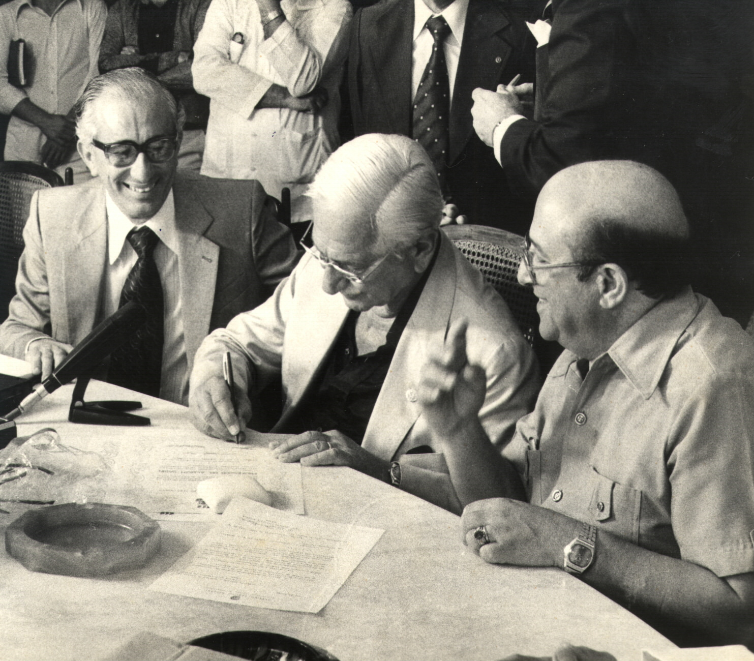 Na entrega da medalha do visitante ilustre da UFPE ao cientista Albert Sabin (1980)